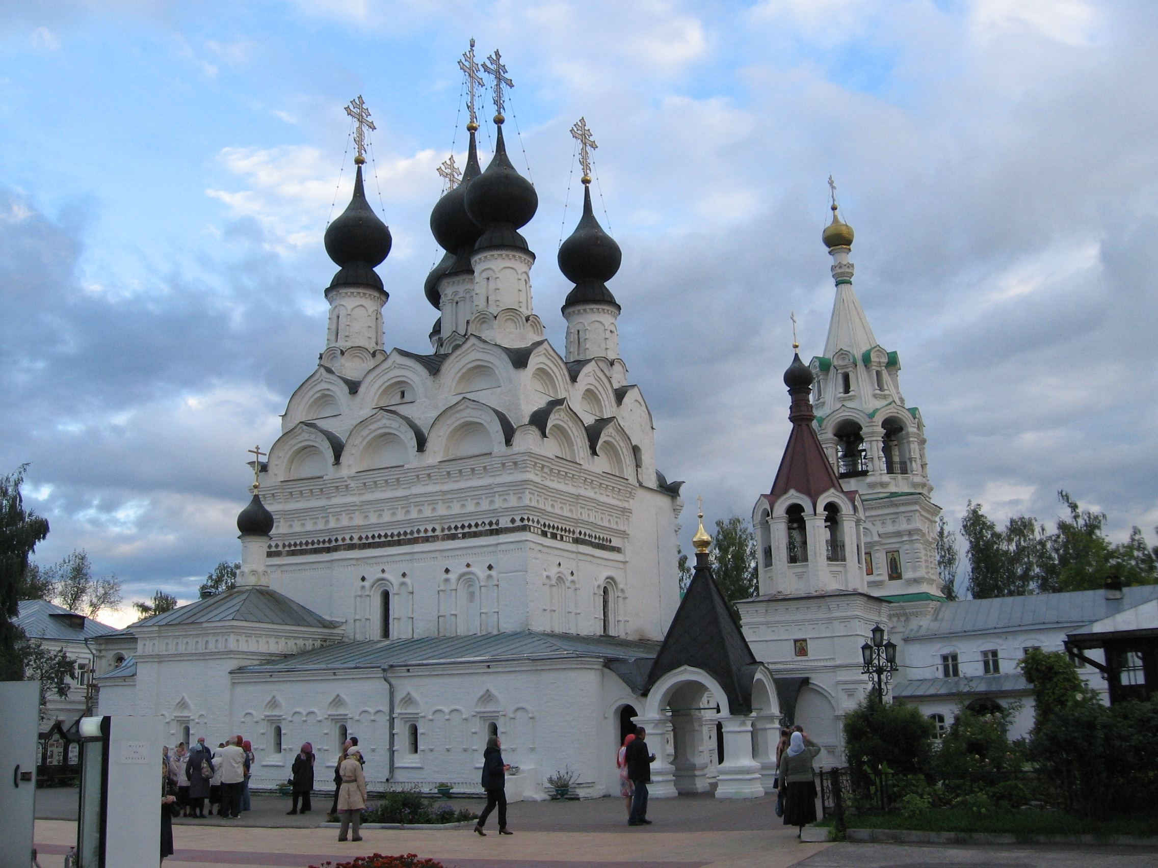 Собор Троицкий (Владимирская область, Муром, Крестьянина площадь)